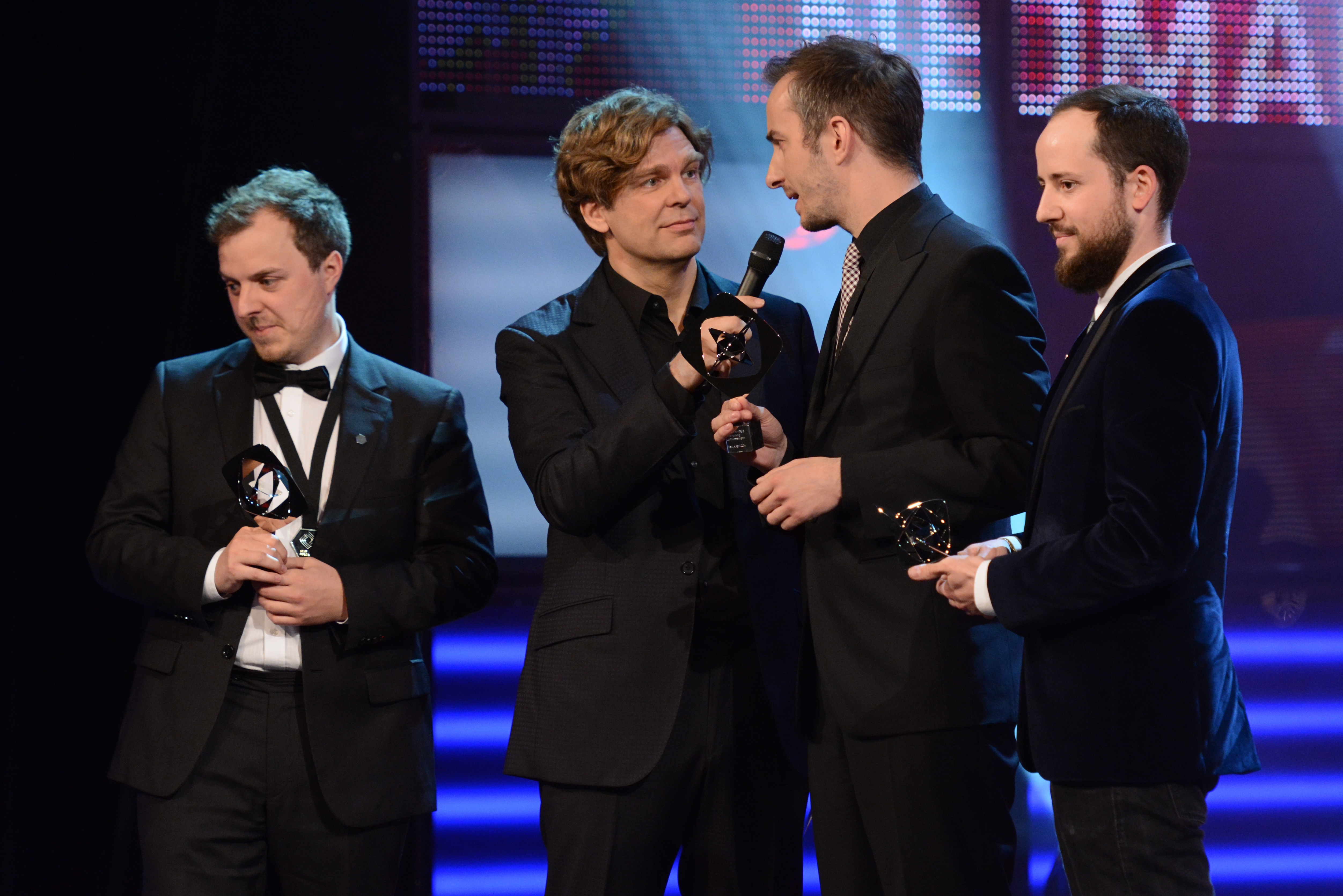 V.l.n.r.: Matthias Schulz, Michael Steinbrecher, Jan Böhmermann, Philipp Käßbohrer bei der Verleihung des Grimme-Preises 2014.